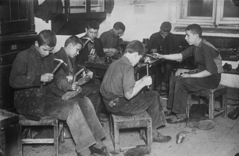 Jugend-Erziehung in Russland! Die elternlose Jugend im heutigen Russland wird in staatlichen Erziehungsanstalten unterrichtet und erlernt dort ein Handwerk. Nach Vollendung der Lehrzeit treten sie in die grossen staatlichen Betriebe ein. Blick in die Schusterwerkstatt der staatlichen Erziehungsanstalt.